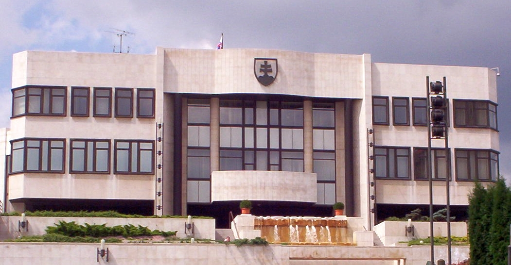 Szlovák parlament, Pozsony